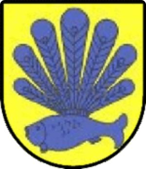 Wappen der ehemaligen Gemeinde Unterbergla, Steiermark